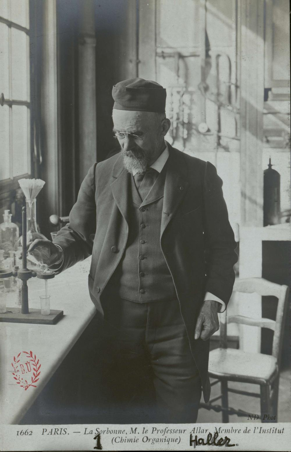 Carte postale